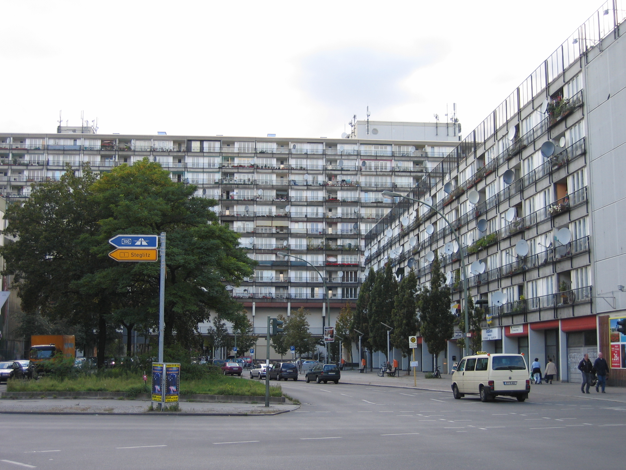 Berliner Sozialpalast